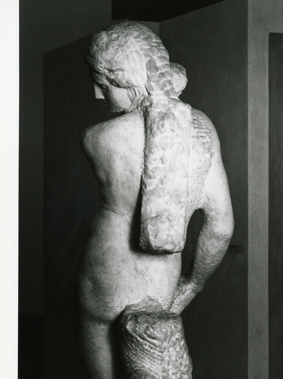 Firenze. Museo Nazionale del Bargello. Sculture. Michelangelo Buonarroti, "Busto di Bruto" e "David". Jacopo Sansovino, "Baccoe fauno". Benvenuto Cellini, "Apollo e Giacinto". Servizio fotografico : Firenze, 1981 / Paolo Monti. - Stampe: 6 : Positivo b/n, gelatina bromuro d'argento/ carta, 18x24. - ((Al verso delle stampe manoscritti i numeri dei negativi corrispondenti (formato 35 mm) con indicazione del fotogramma: 3640/28, 3641/23, 3642/16, 3643/3, 3648/37, 3650/15, 3650/19; timbro a inchiostro con copyright (Corso Sempione - Milano). - Sul coperchio della scatola iscrizione didascalica manoscritta a pennarello nero: "Genova - Bologna". - Occasione: Documentazione per la pubblicazione cataloghi del Museo del Bargello. - Fonte: Agenda di Paolo Monti: Nikon Leika 3001-/ Monti 1978 (1978-1982), presso Archivio Paolo Monti. - Fonte: Fattura di Paolo Monti: IV. Commesse/ Fattura n. 29/ Riprese fotografiche sculture, quadri, monete e medaglie e oggetti vari del Museo Bargello in Firenze (1981/10/05), presso Archivio Paolo Monti. N. 315 fotografie in b/n e N. 29 fotocolor diapositive formato 24x36 per pubblicazione cataloghi del Museo Bargello. Totale 344 fotografie. - Fonte: Lettera di Gaeta Bertelà, Giovanna: IV. Commesse/ Lettera/ Museo Nazionale del Bargello - Firenze; Soprintendenza ai Beni artistici e storici di Firenze e Pistoia (1981/07/21), presso Archivio Paolo Monti. Lettera dattiloscritta indirizzata a Monti in cui gli si comunica di intestare fattura a SPES - SAS (la suddetta fattura è pinzata insieme alla lettera). - Fonte: Monografia di Von Hessen, Otto (a cura di): Gioielli franchi della collezione Carrand, catalogo della mostra, Firenze 1981, Firenze, Studio per Edizioni Scelte (1981). - Fonte: Monografia di Pollard Graham (a cura di): Medaglie italiane del Rinascimento, catalogo della mostra, Firenze 1983, Firenze, Studio per Edizioni Scelte (1983)